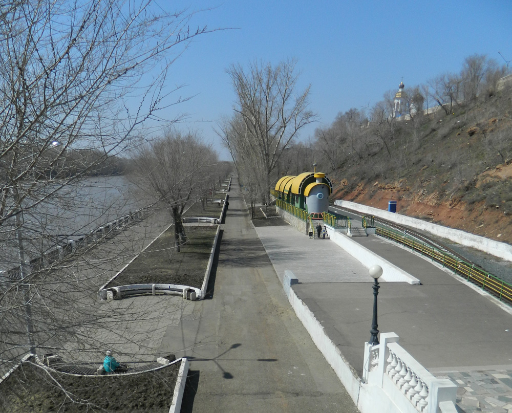 Станция Комсомольская Оренбургской детской железной дороги имени П.А. Кобозева